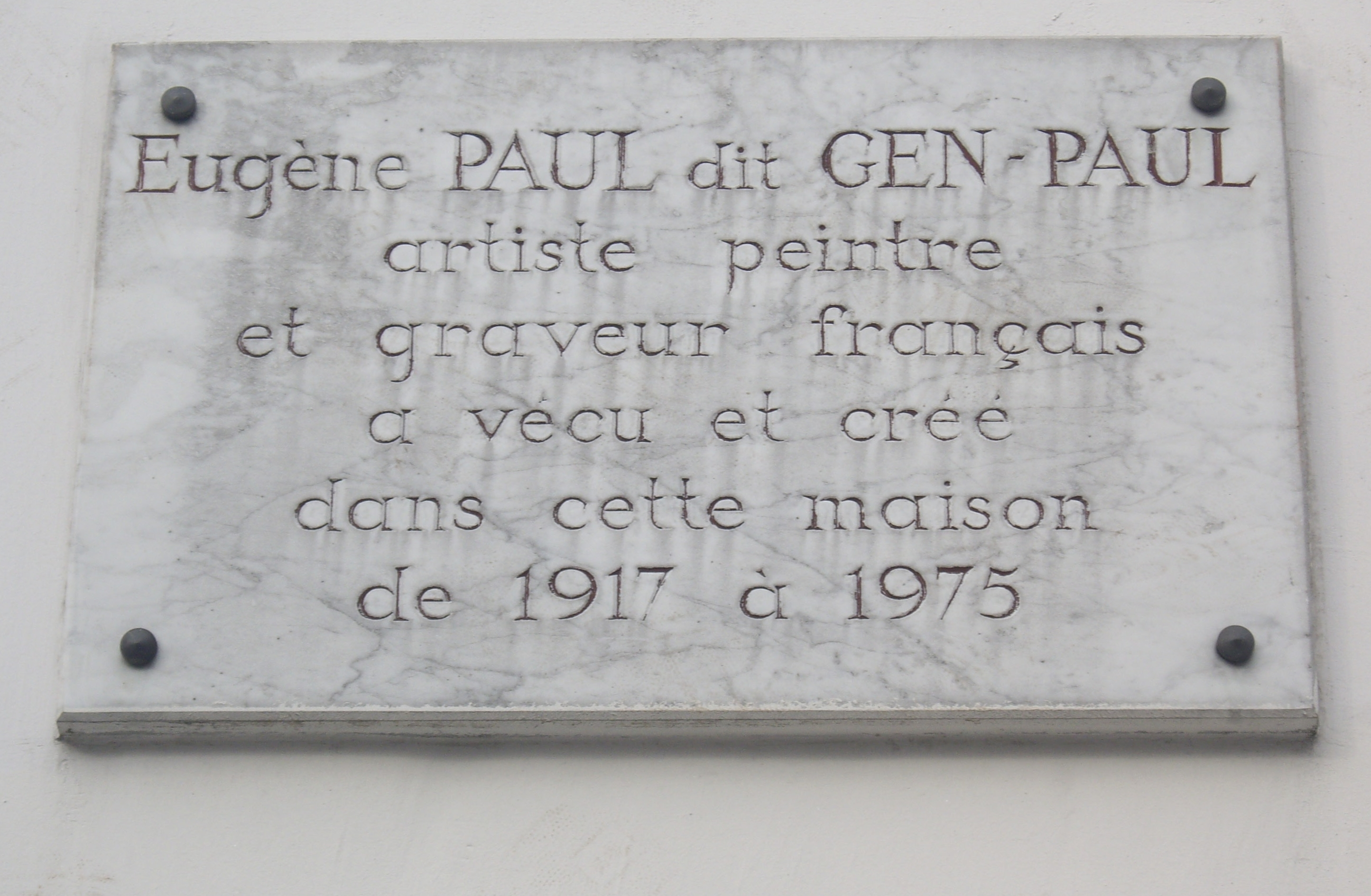 Plaque apposée au n° 2 de l'impasse Girardon, Paris 18e, où vécut et travailla l'artiste peintre Eugène Paul, dit Gen-Paul (1895-1975), de 1917 à 1975.